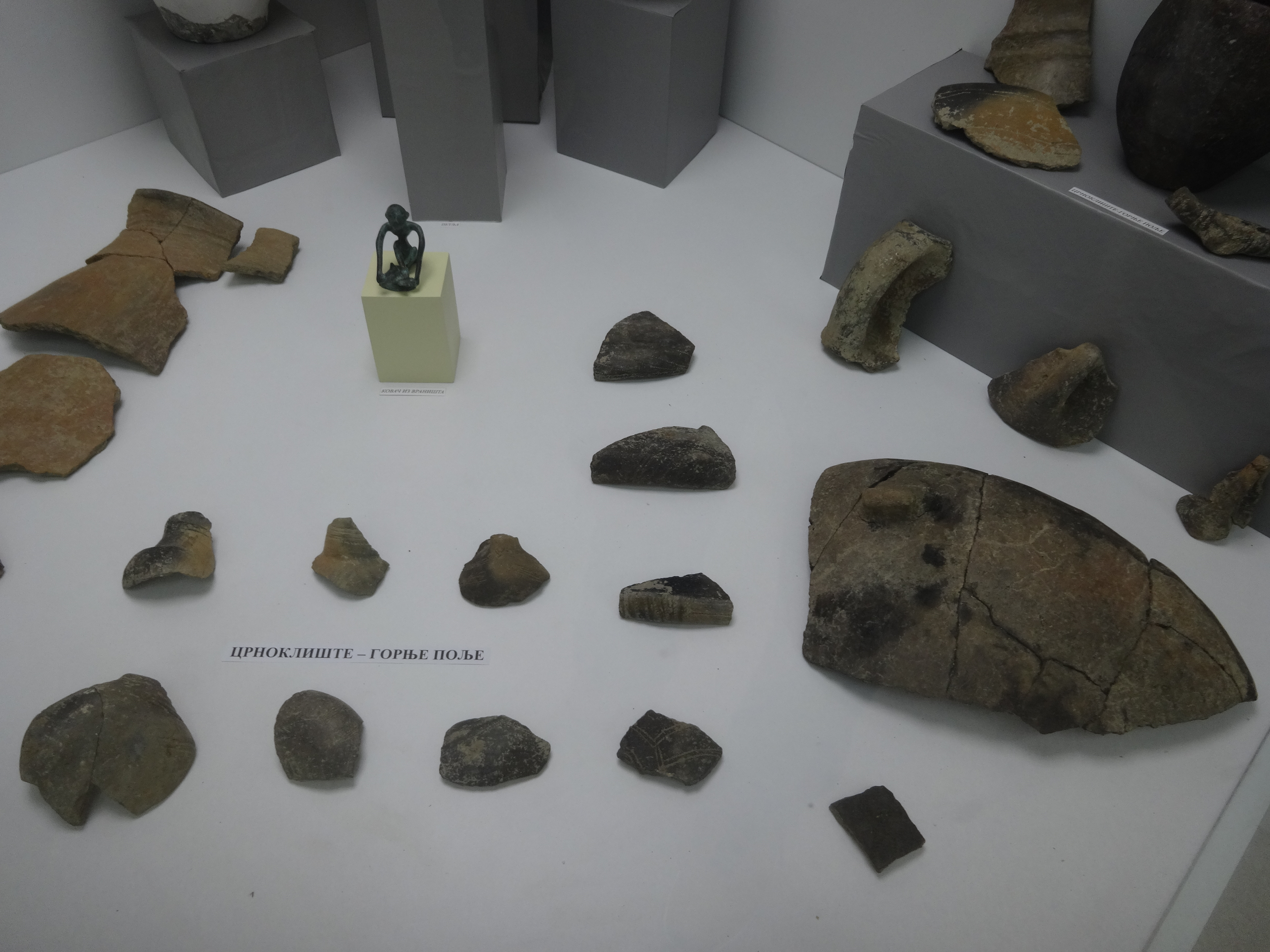 Muzej u Pirotu, eksponati su prikupljani na području tvrđave